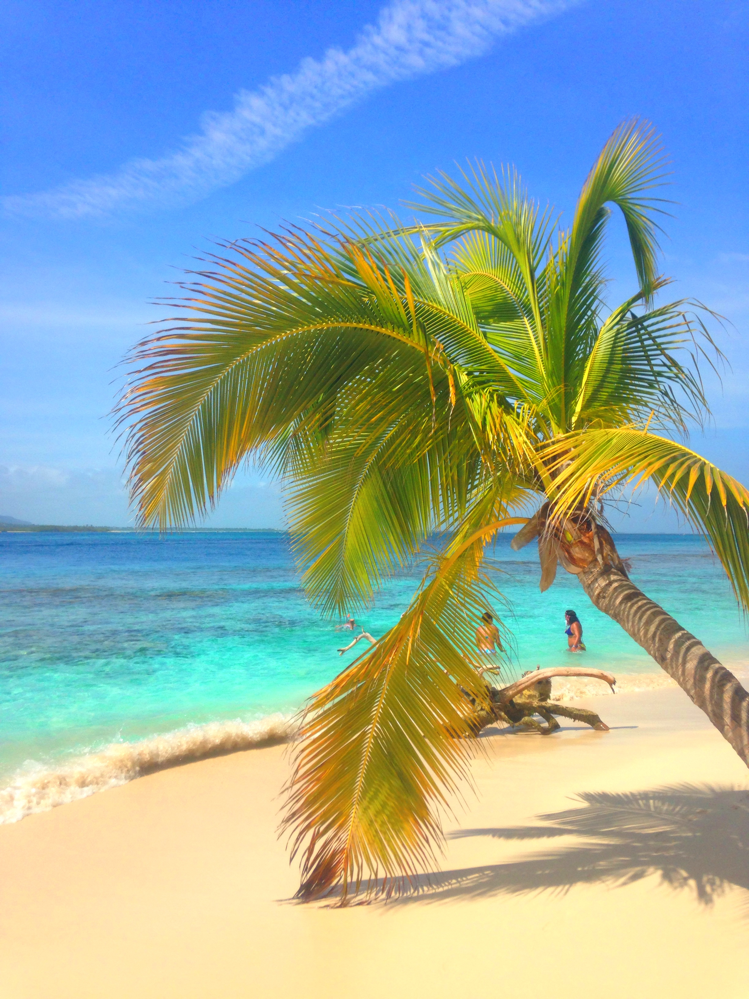 Vista al Mar en Cayo Sombrero - Chichiriviche - Venezuela